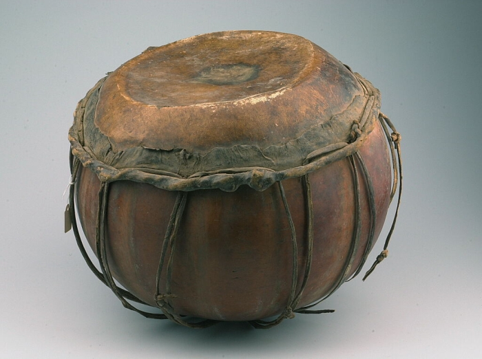 Het vel is op het tromlichaam bevestigd door middel van spankoorden die aan een hoepel bevestigd zijn. (Sommige spankoorden zijn gebroken.)